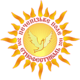 Печенізьке поле (фестиваль) логотип